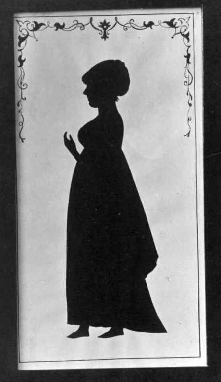 Sara Martine Juel født Fegth. Født 1 februar 1791 Tangen (Drammen). Død 22 mars 1862 Liløen, Strømsø. Gift med Anders Reiersen Juel (1787–1852).